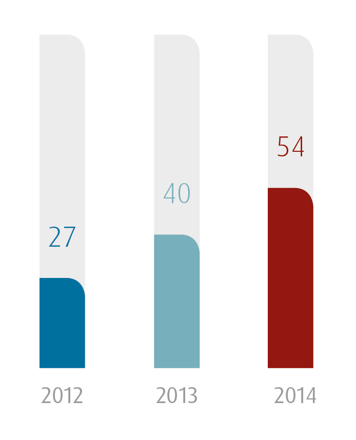 Die Entwicklung der mobilen Internetnutzung in Deutschland 2012-2104